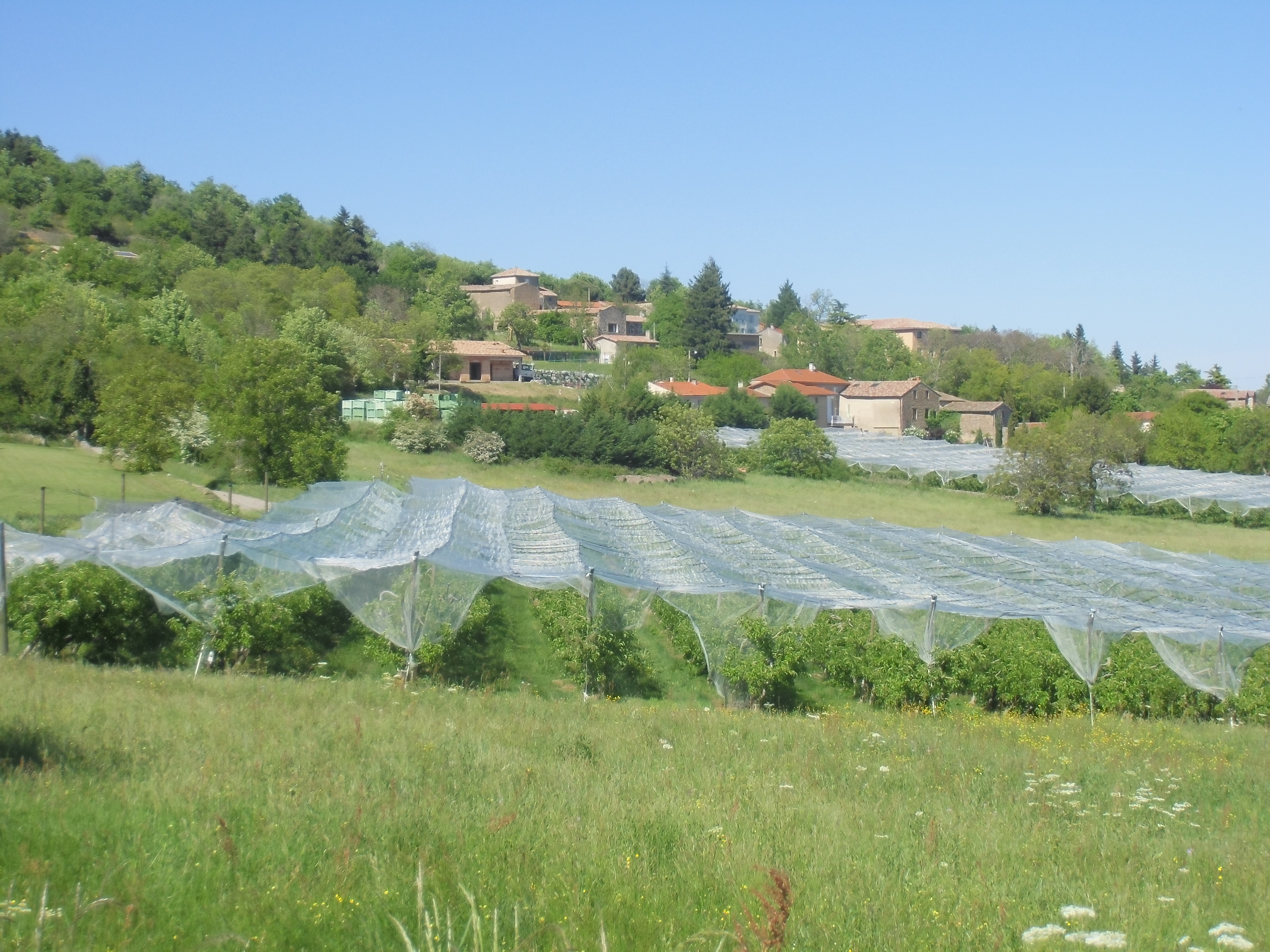 Le hameau du Buisson, appartenant à la commune de Véranne.